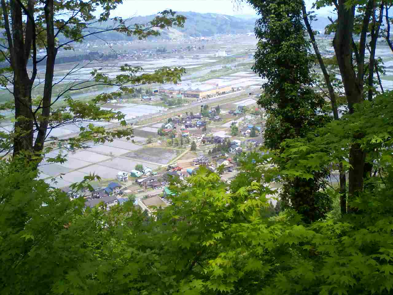 この画像は2010年5月16日投稿者によって、新潟県南魚沼市にある六万騎山にて撮影された六日町盆地の写真。関越自動車道と魚野川の間に建つ大型建築物は株式会社雪国まいたけ 第１バイオセンター。